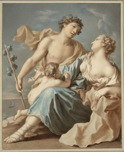 Bacchus und Ariadne am Meeresufer: Kopie von Heinrich Gotthelf Schaufuß nach Giovanni Antonio Pellegrini. Aufbewahrungsort: Albertina, Wien